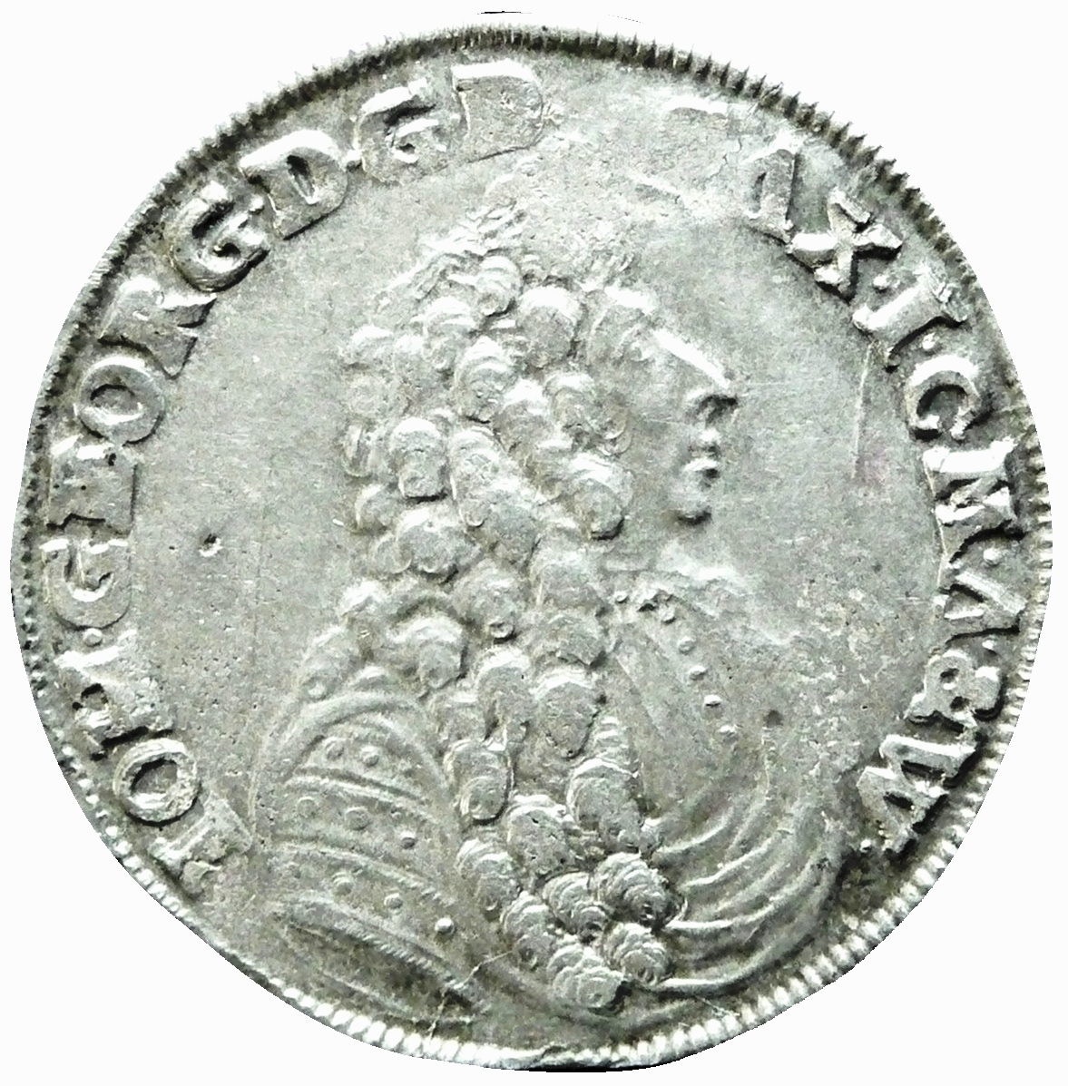 Zweidritteltaler (Gulden) 1690 Wert = 16 Groschen Johann Georg II. Herzog von Sachsen-Eisenach (1680-1698) Prägung 1690 Münzstätte Eisenach, Münzmeister Heinrich Christian Müller im Amt 1689-1690 Prägung im 12-Taler-Münzfuß von Leipzig, 18 Stück auf die feinen Mark, Feingewicht: 12,992 g; Reichsmünzfuß ab 01.12.1738 durch Kaiserliches Kommissionsdekret von Karl VI. Der Silbergehalt unterlag Schwankungen, damit auch das Gewicht zwischen 17,323 g bei 12 Loth = 750‰ Silber und 15,607 g bei 15 Loth 4 Grän = 951,389‰ Silber Gewicht: 16,53 g Durchmesser: 37,02-37,89 mm Dicke: 2,06 mm beidseitig Rändelung, Kante glatt / Kehrprägung Avers: Brustbild des Herzogs nach rechts mit Allongeperücke im Harnisch mit Überwurf; Münzherr und Herrschertitel als Umschrift von links beginnend nach rechts in lateinischer Kapitalschrift IOH◦GEORG◦D◦G◦D◦SAX◦I◦C◦M◦A◦&◦W◦ = JOHANNES GEORGIUS DEI GRATIA DUX SAXONIAE IVLIACI CLIVIAE MONTIUM ANGARIAE ET WESTPHALIA (Johann Georg von Gottes Gnaden Herzog zu Sachsen, Jülich, Kleve, Berg, Engern und Westfalen)